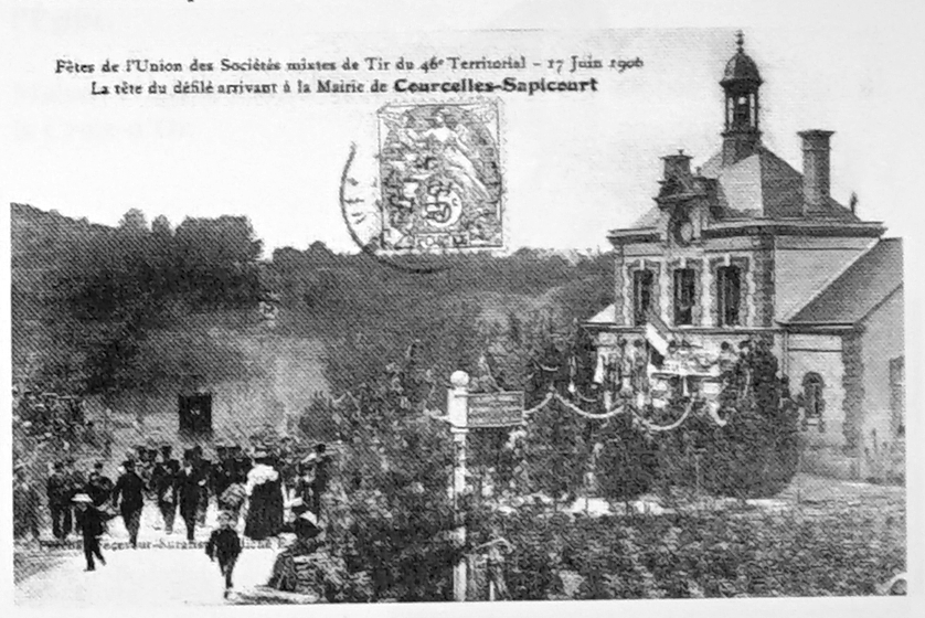 sur une carte postale du début du XXe siècle.